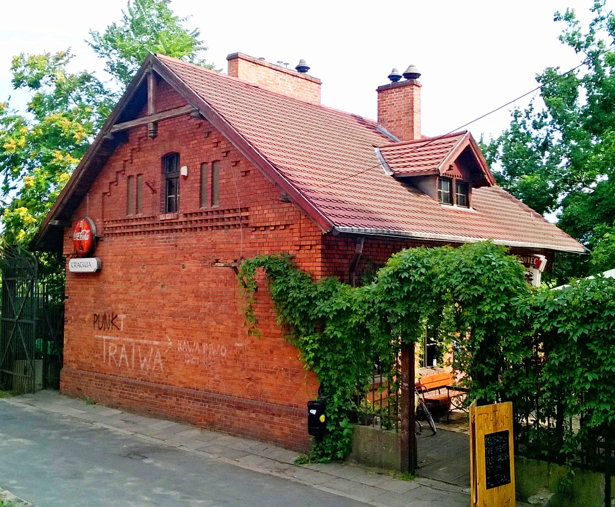 Dom gazownika przy ul. Flisaczej w Toruniu